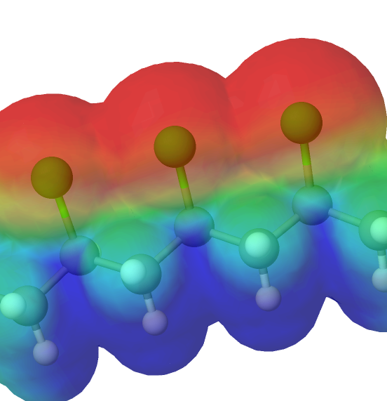 MEP transparent von PVC, um die Polarität der Seitegruppe zu zeigen.